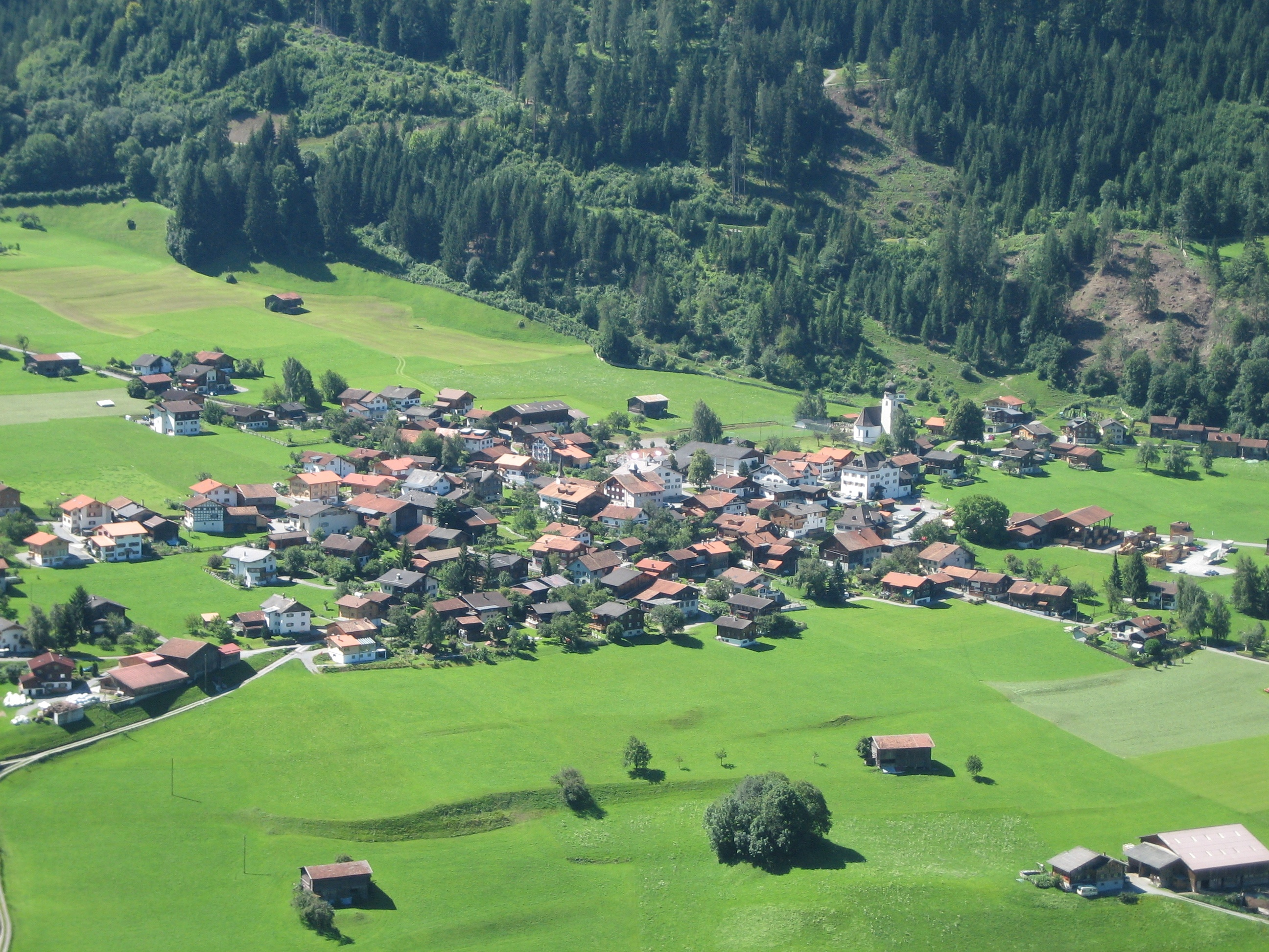 Fideris GR